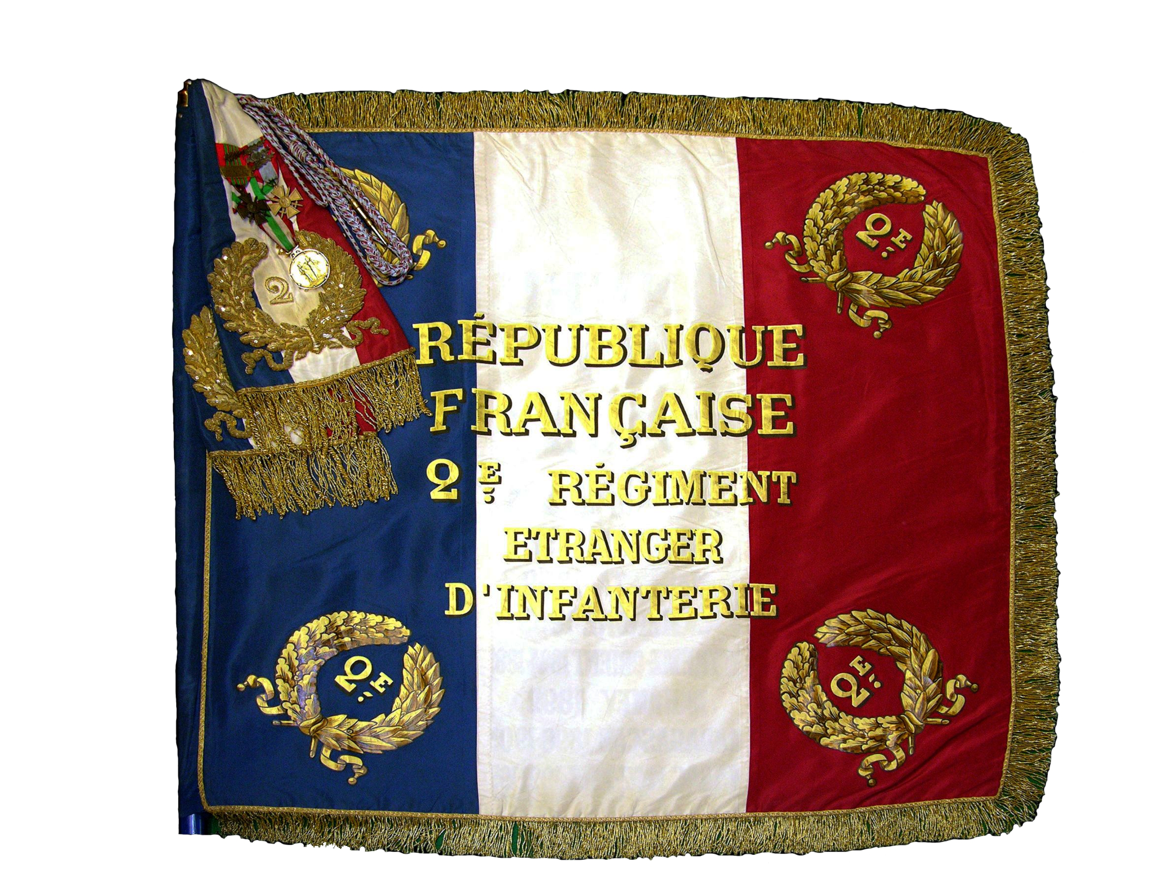 Drapeau du 2e Régiment étranger d'infanterie (Nîmes, France) recto